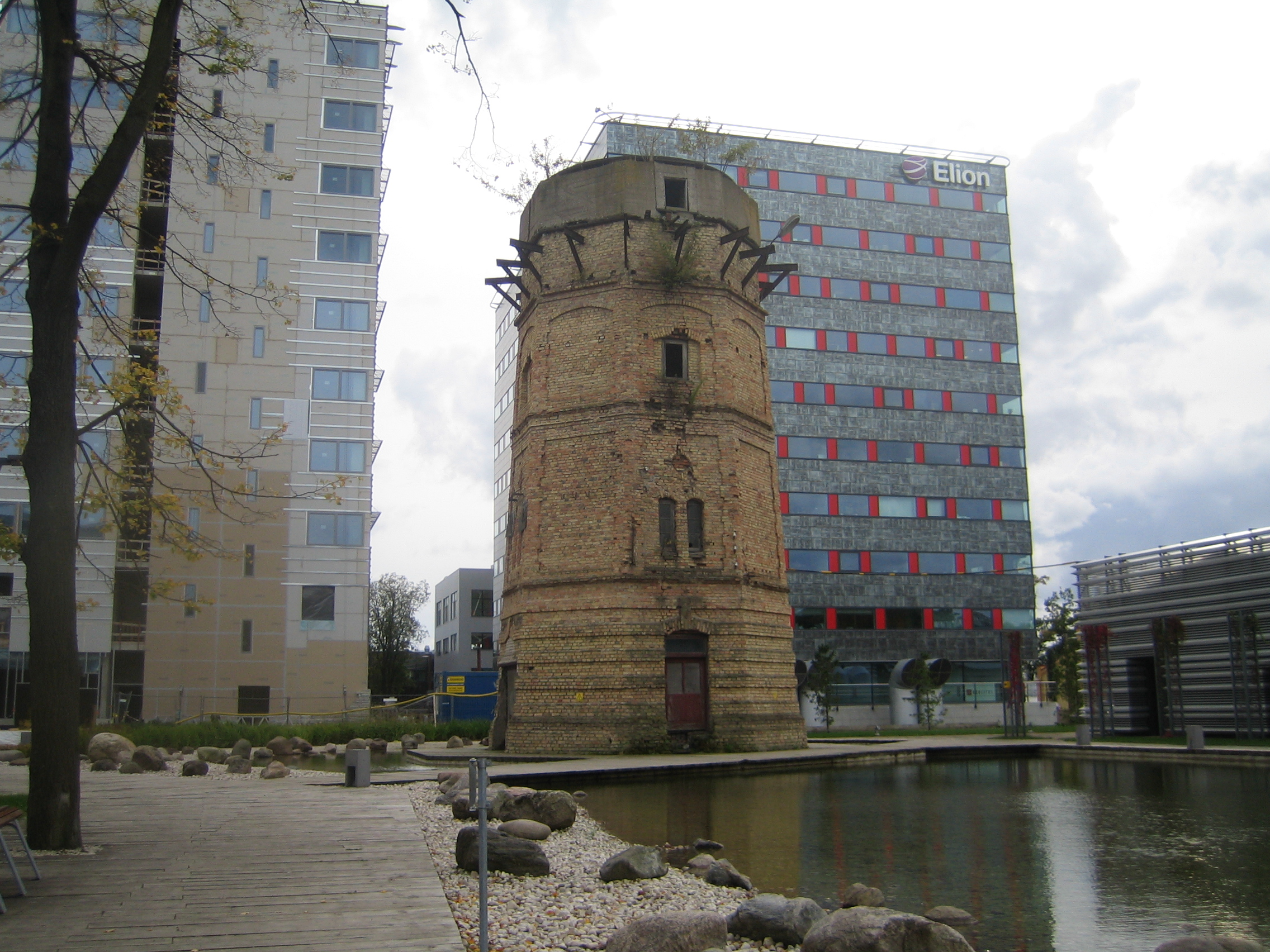 Dvigateli veetorn tööstuspargis